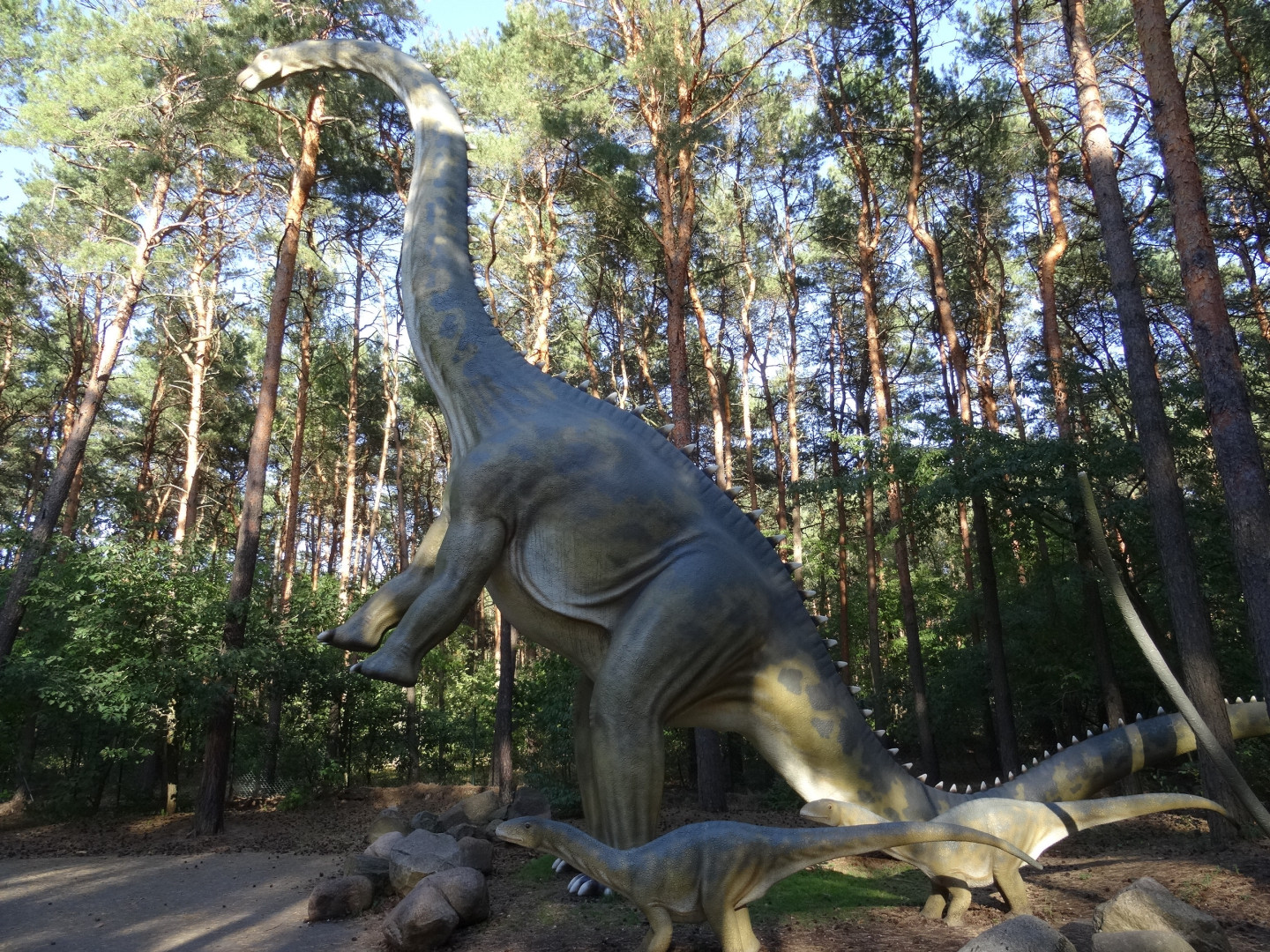 Zaginiony Świat - ekspozycja przedstawiająca dzieje życia na Ziemi, z uwypukleniem ery dinozaurów na terenie Leśnego Parku Kultury i Wypoczynku "Myślęcinek" w Bydgoszczy